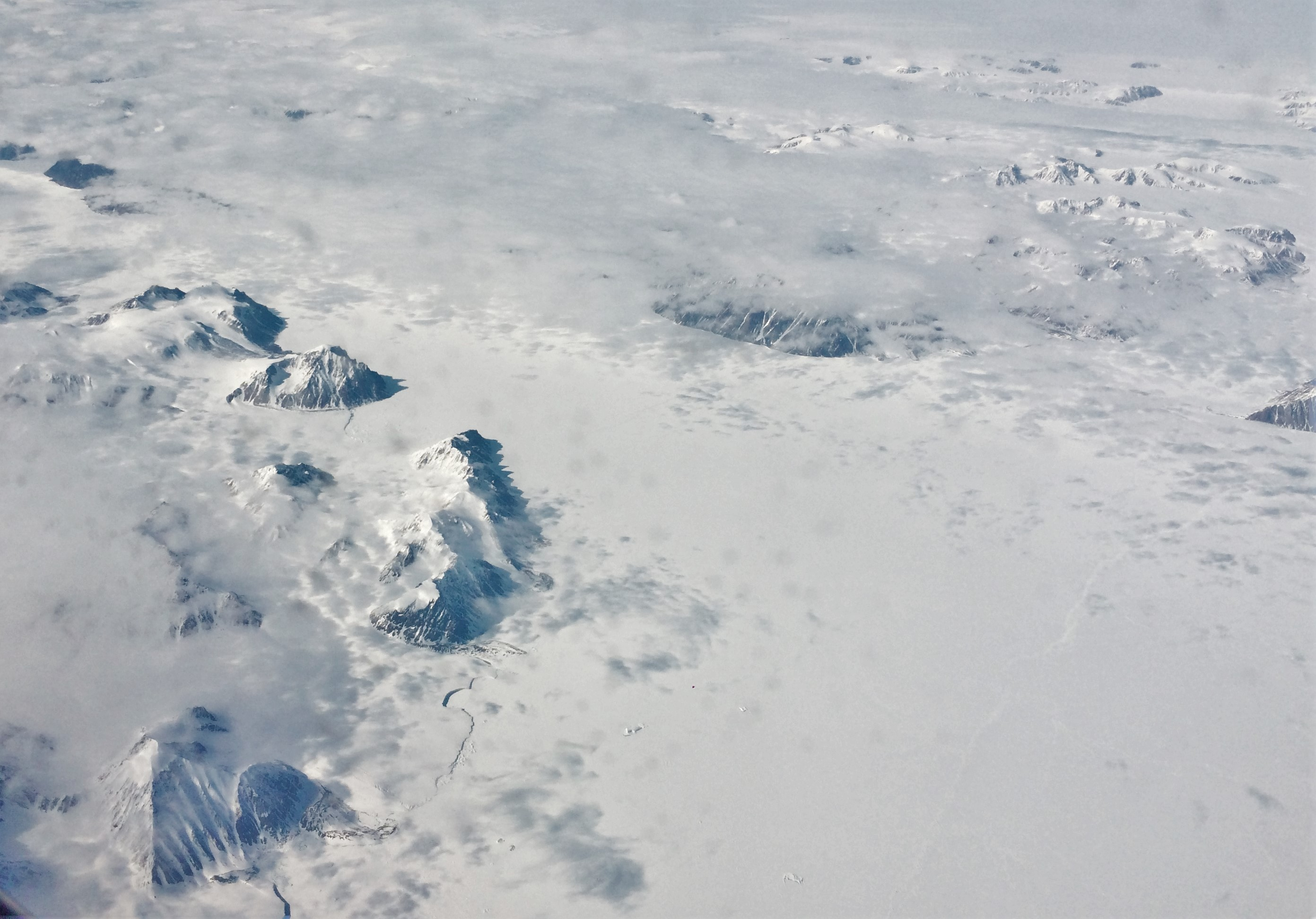 Stretto Makinson Inlet